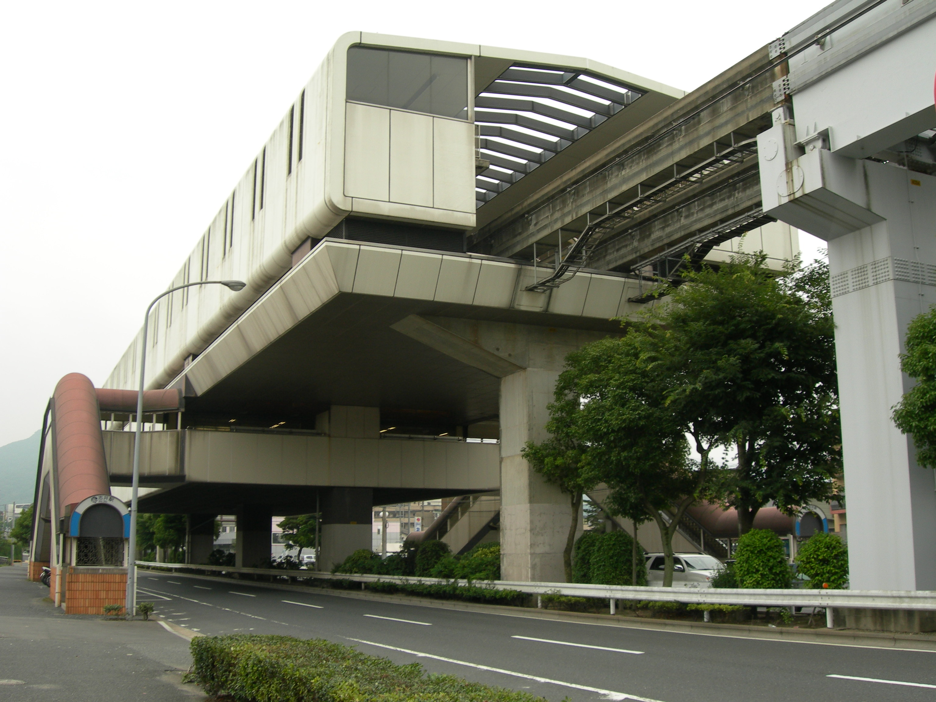 志井駅 (北九州高速鉄道)